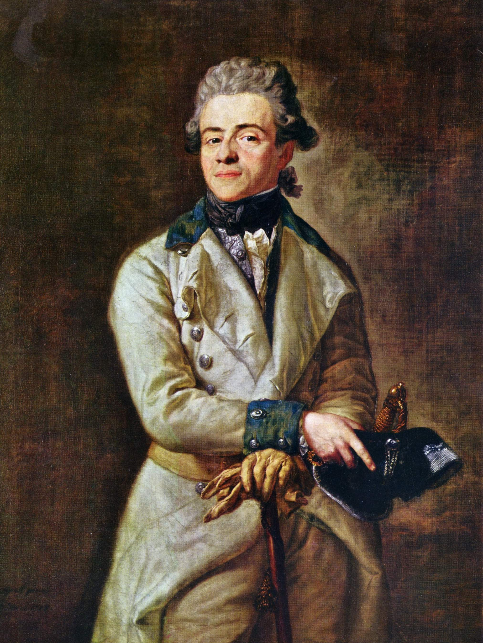 in an Giambattista Tiepolo erinnernder Maltechnik, Verzicht auf üblichen Dekor, Gesicht, Hände, Körperhaltung spiegeln das Wesen des Porträtierten, eines der frühen neuzeitlichen Beispiele realistischer Porträtmalerei